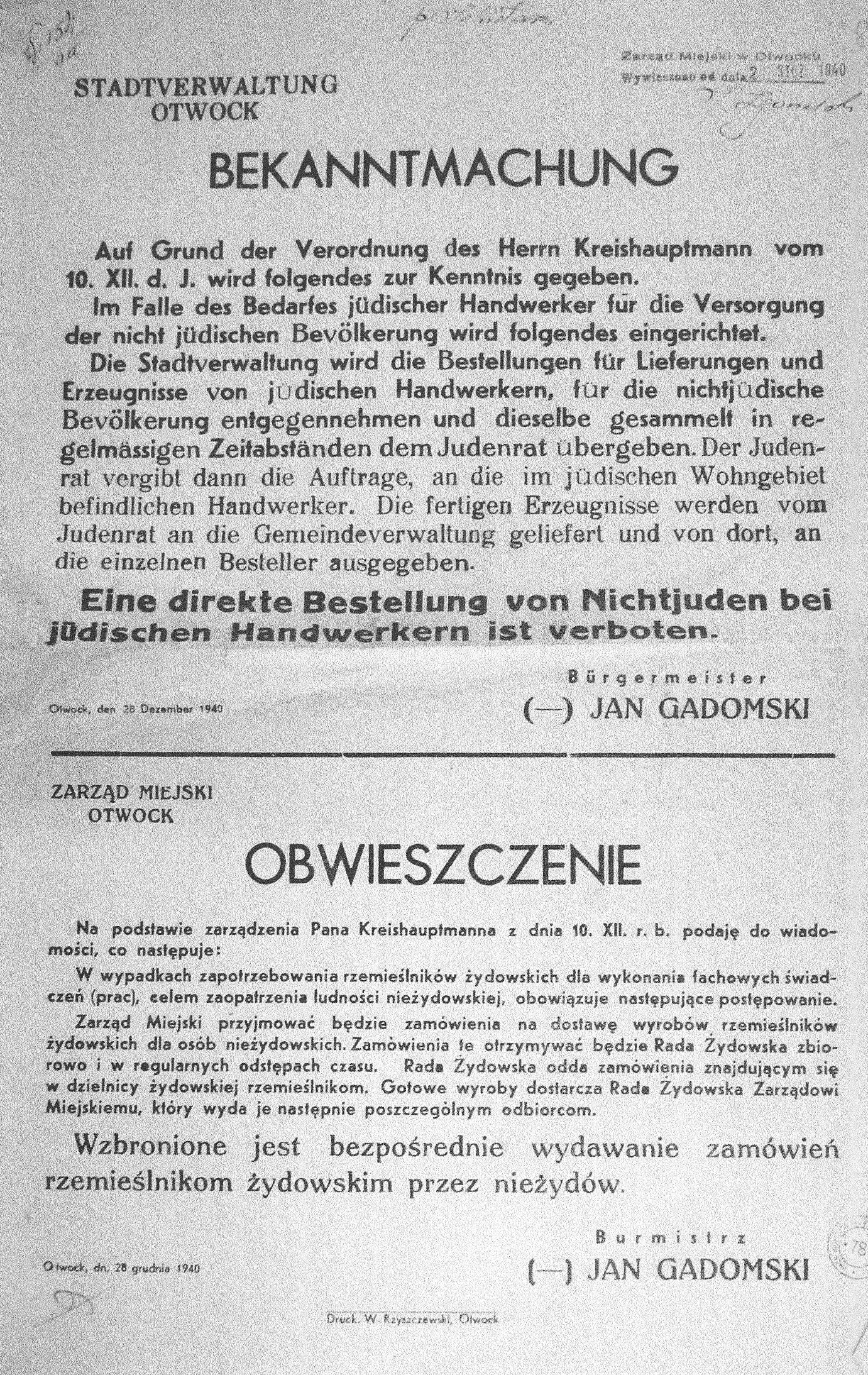 Obwieszczenie w sprawie zapotrzebowania na rzemieślników żydowskich wydane przez burmistrza Otwocka Jana Gadomskiego